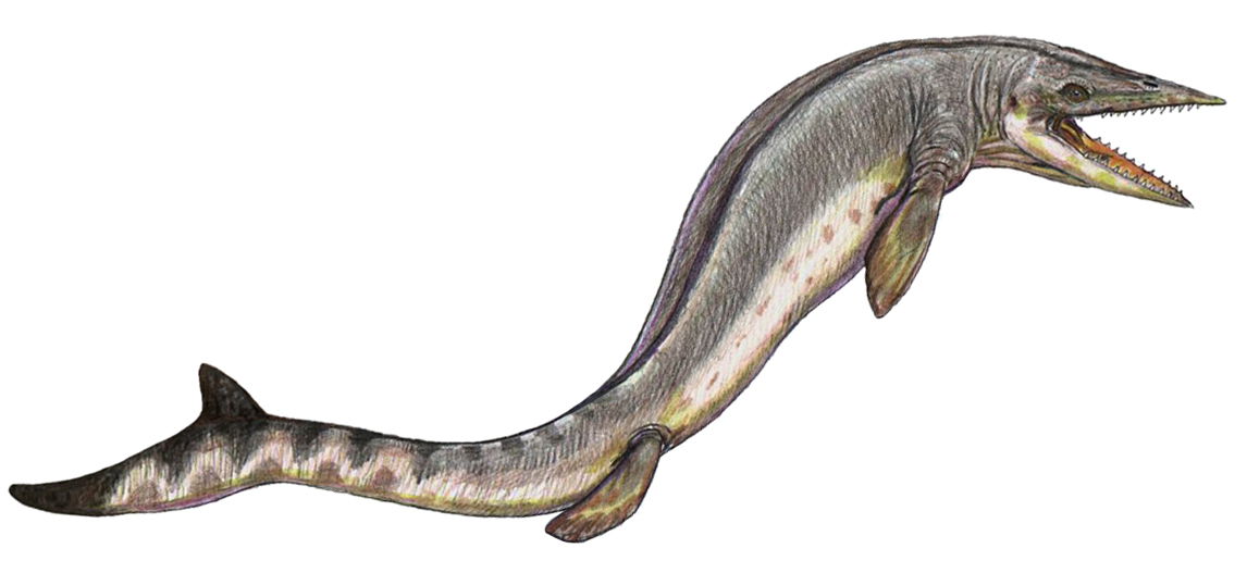 Taniwhasaurus species mosasaur